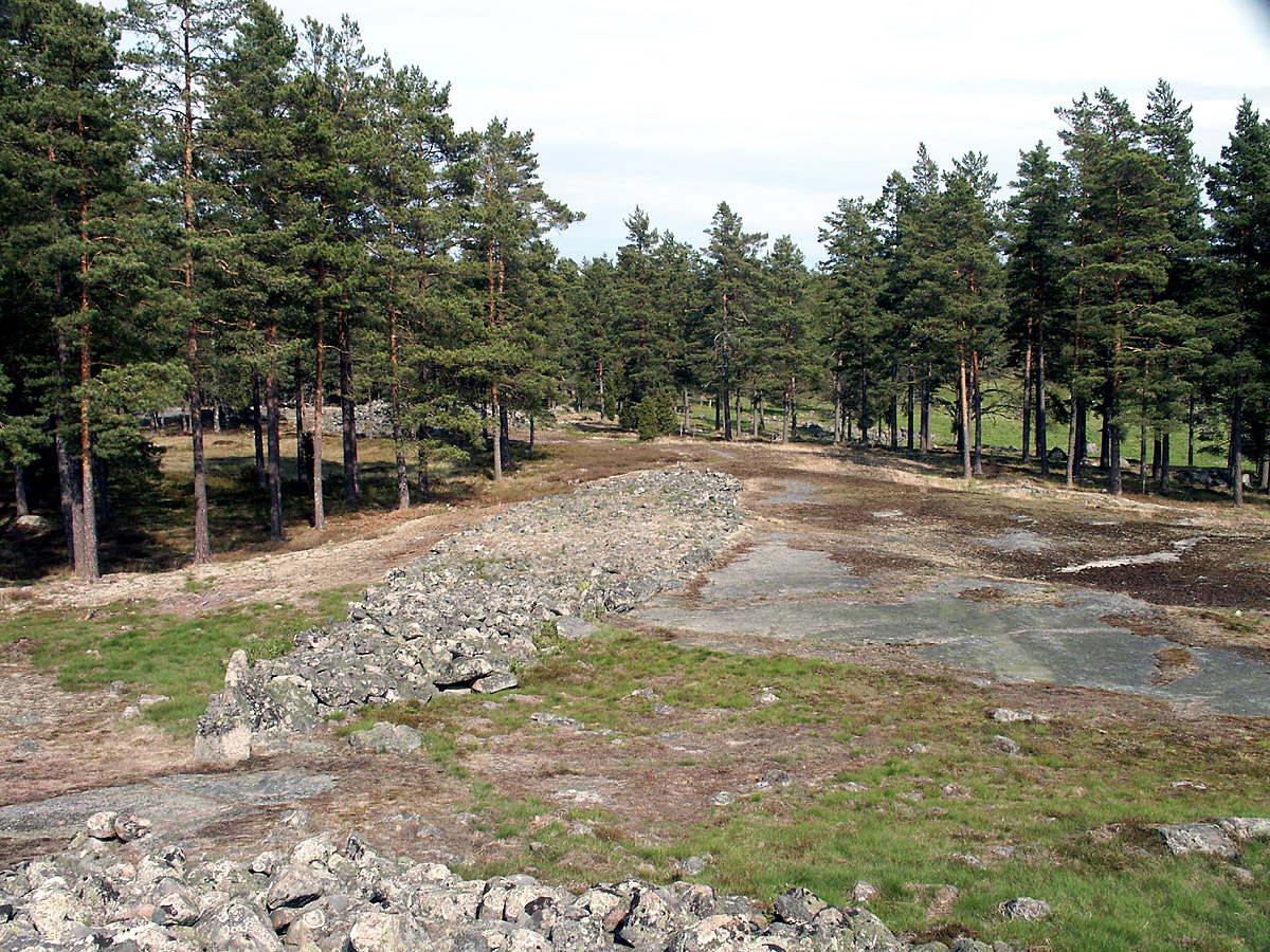 40x7 meter stor skeppssättning. Ingår i ett gravfält från bornsålder med runt 25 gravar.